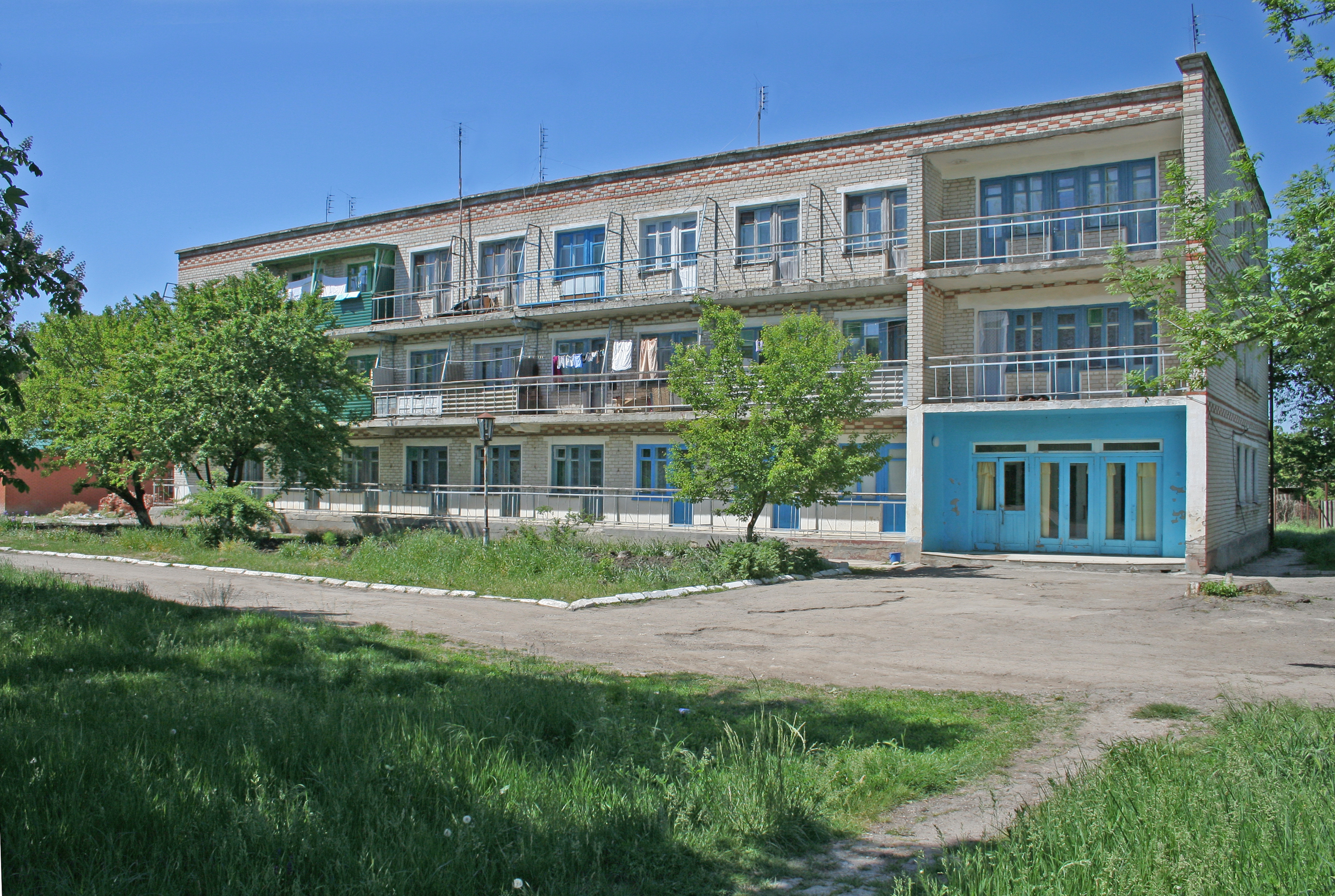 Общежитие поселка Черноморского